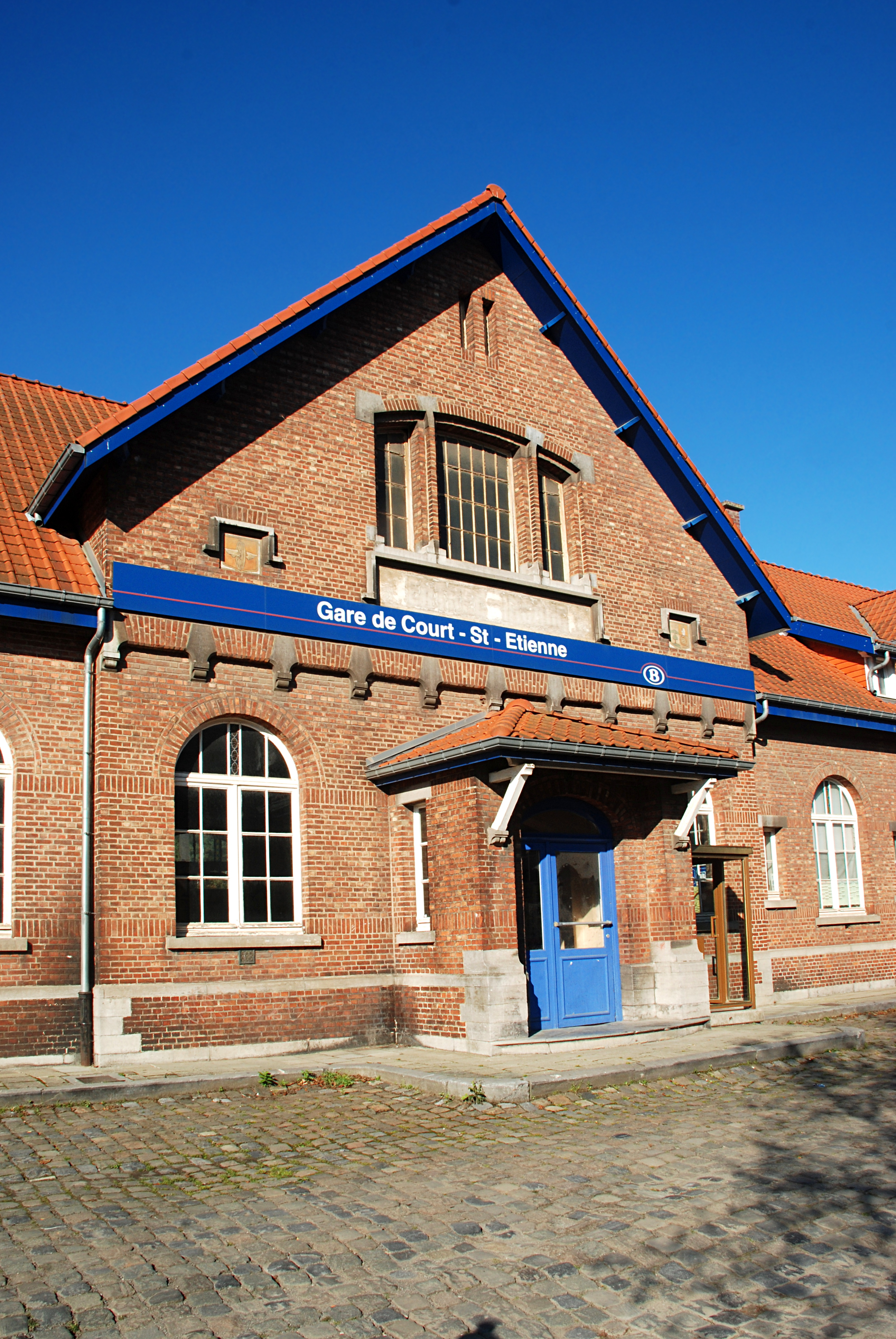 Belgique - Brabant wallon - Court-Saint-Étienne - Gare